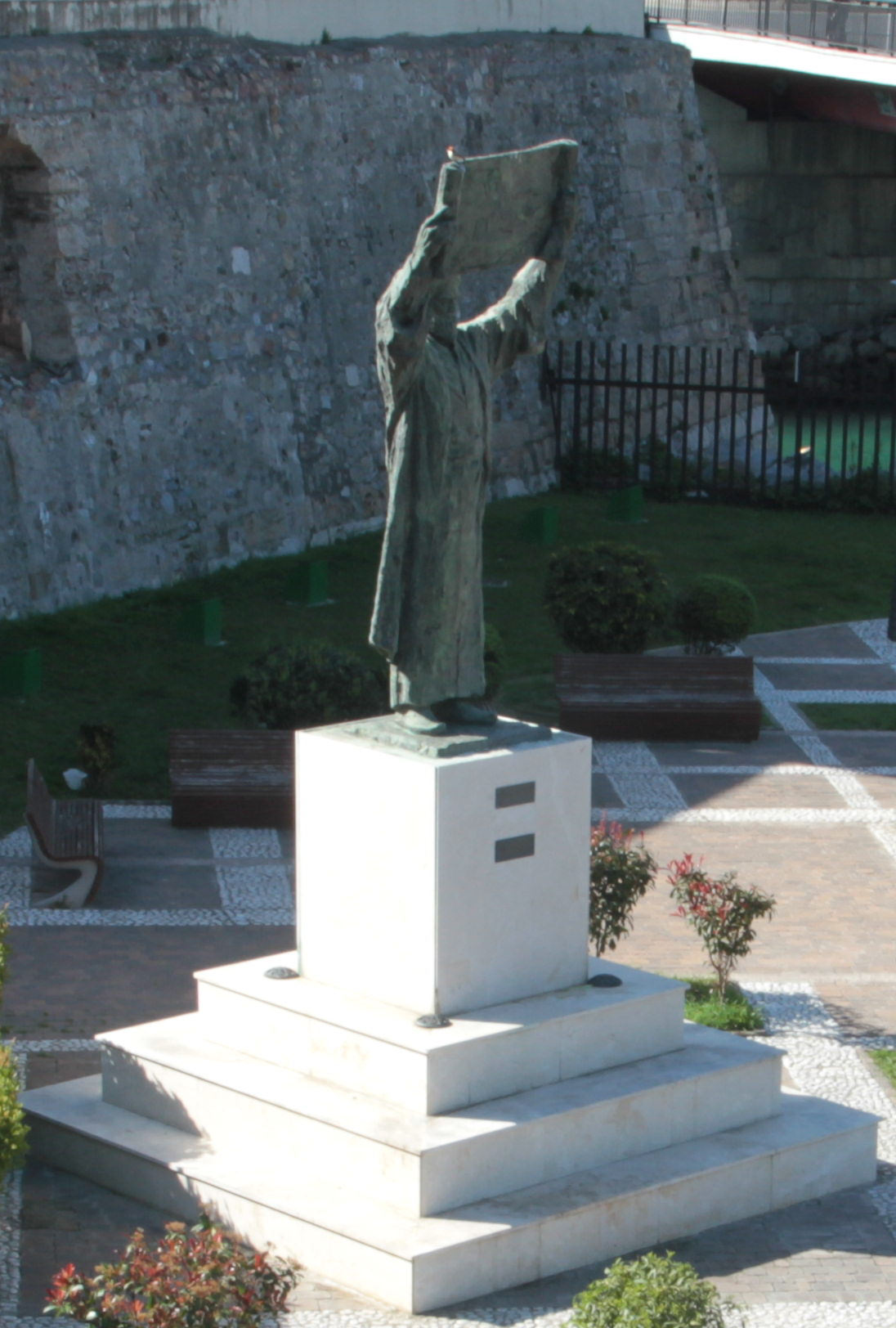 Estatua de Al-Idrisi bajo el baluarte de los Mallorquines, Ceuta